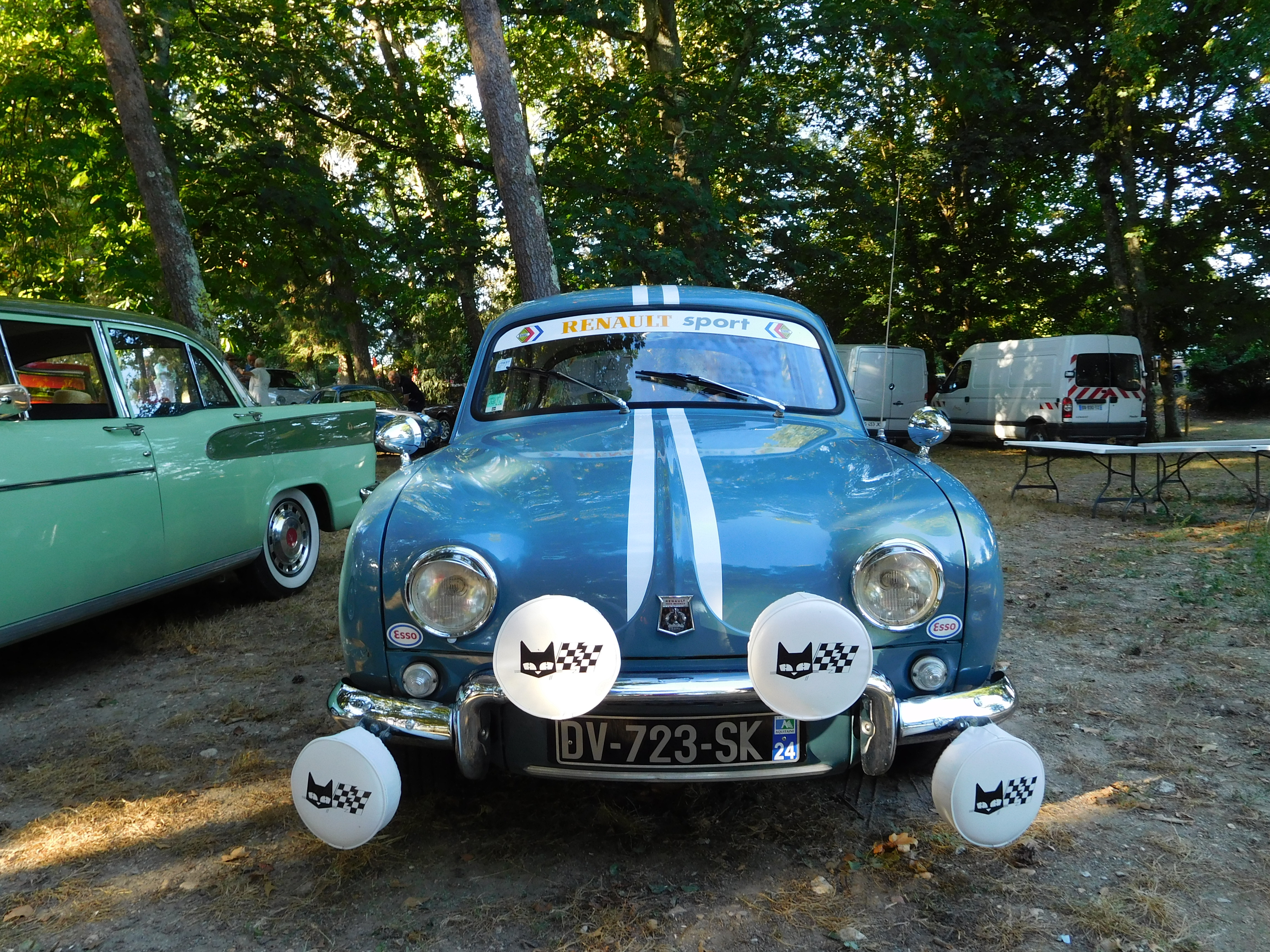 Renault Dauphine Gordini bleue. Au parc Voulgre, Mussidan (Dordogne, France).